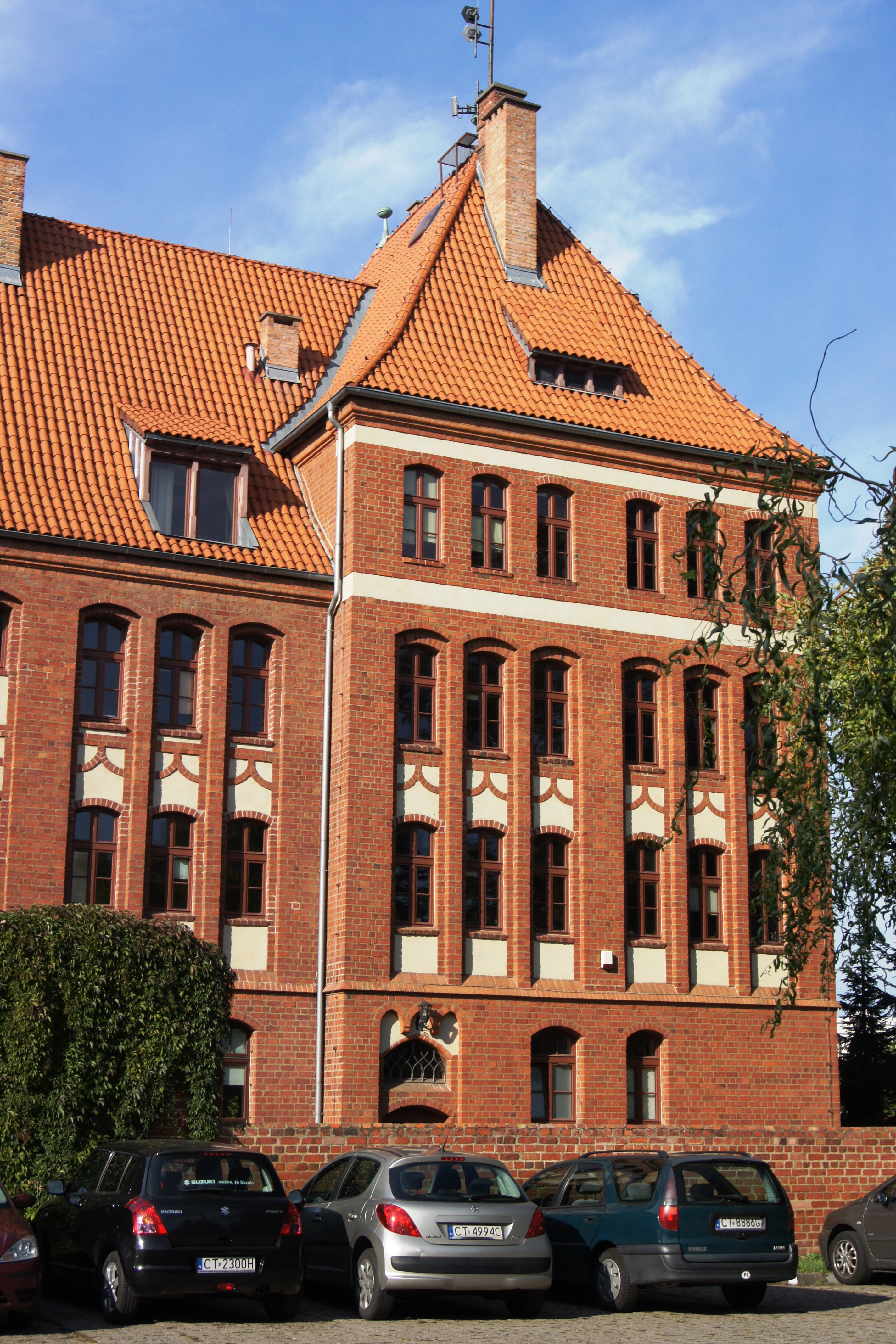 Toruń, Wały Generała Władysława Sikorskiego 8 - dawny budynek Urzędu Miasta Torunia